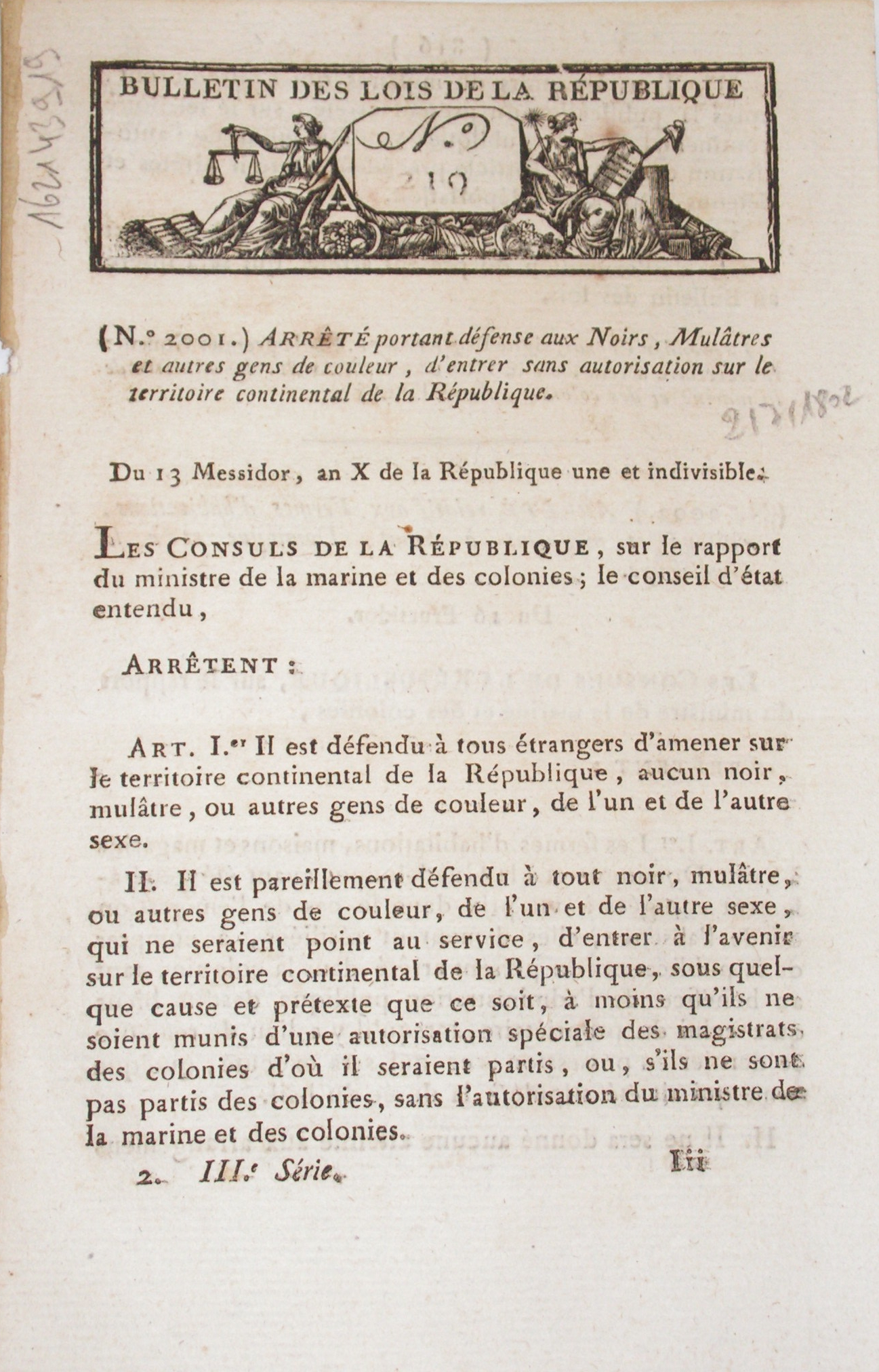 Arrêté du 13 messidor an 10 (2 juillet 1802) portant défense aux Noirs, Mulâtres et autres gens de couleur, d'entrer sans autorisation sur le territoire de la République. (III, Bull, ccxix, n° 2001).